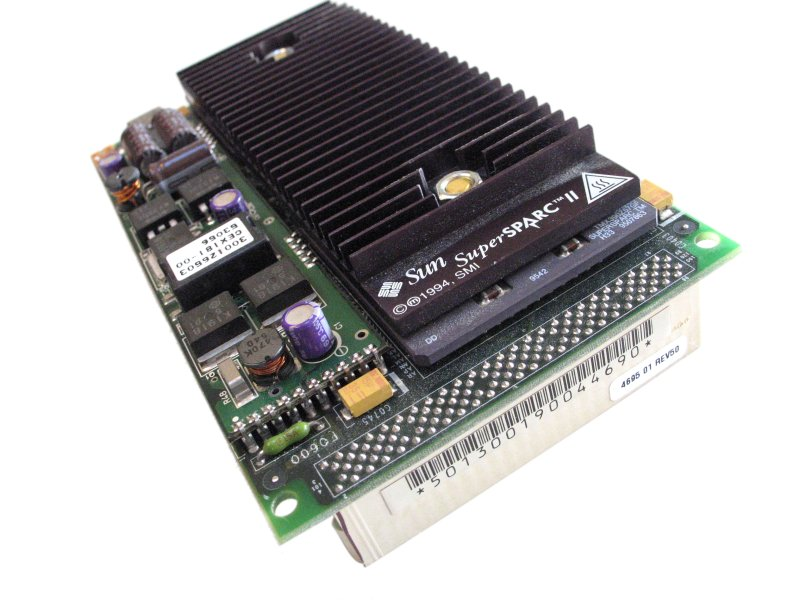 Sun SuperSPARC II SM71 Module @ 75 MHz Part Number 501-3001 Photo by Mitchell Ferschweiler